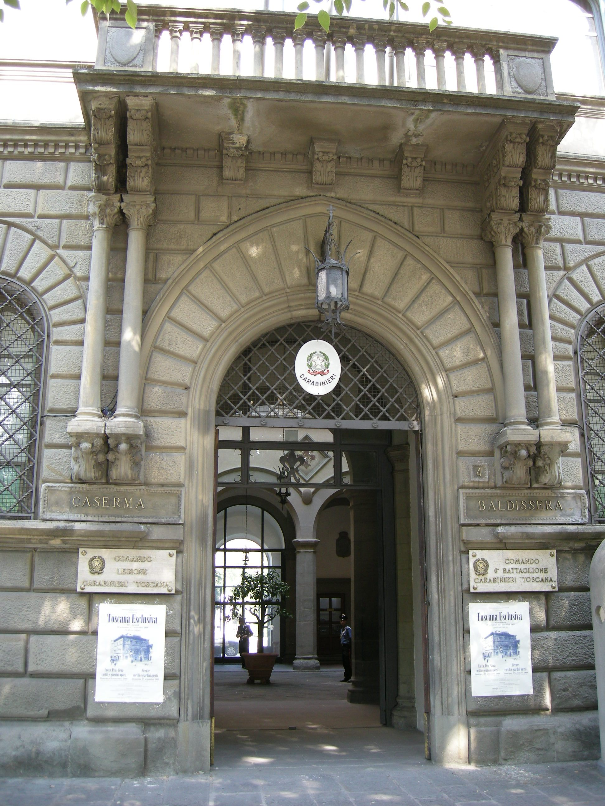 Caserna antonio baldissera